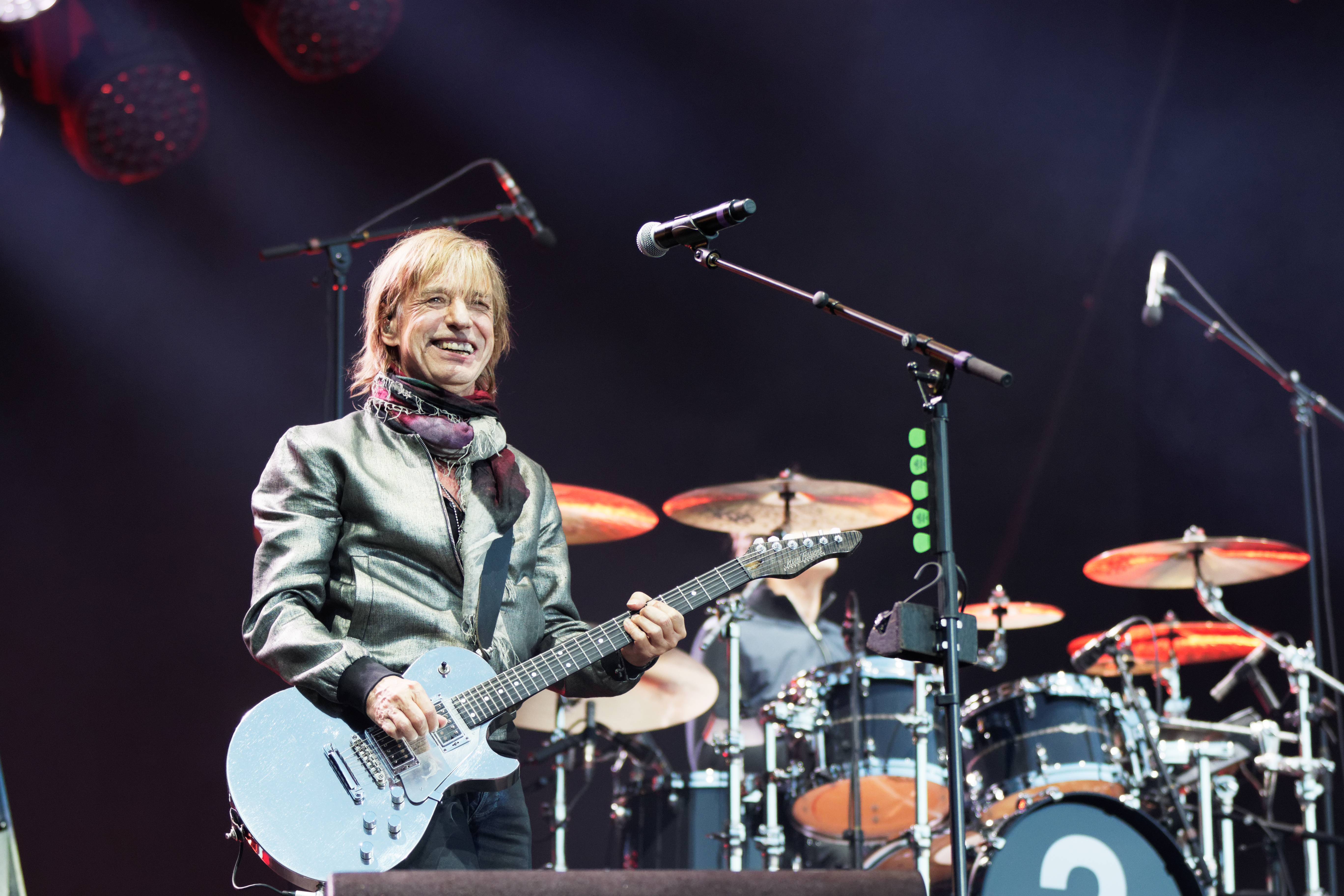 Les Insus en concert lors du festival des vieilles charrues 2016.